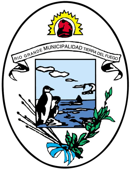 Escudo de la ciudad de Rio Grande, Tierra del Fuego Antártida e Islas del Atlántico Sur, Argentina.